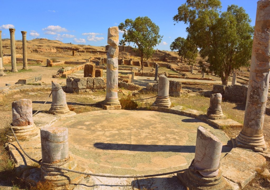 Subsructions d'un grand temple consacré sous Marc Aurèle, probablement à Mercure, Henchir Kasbat